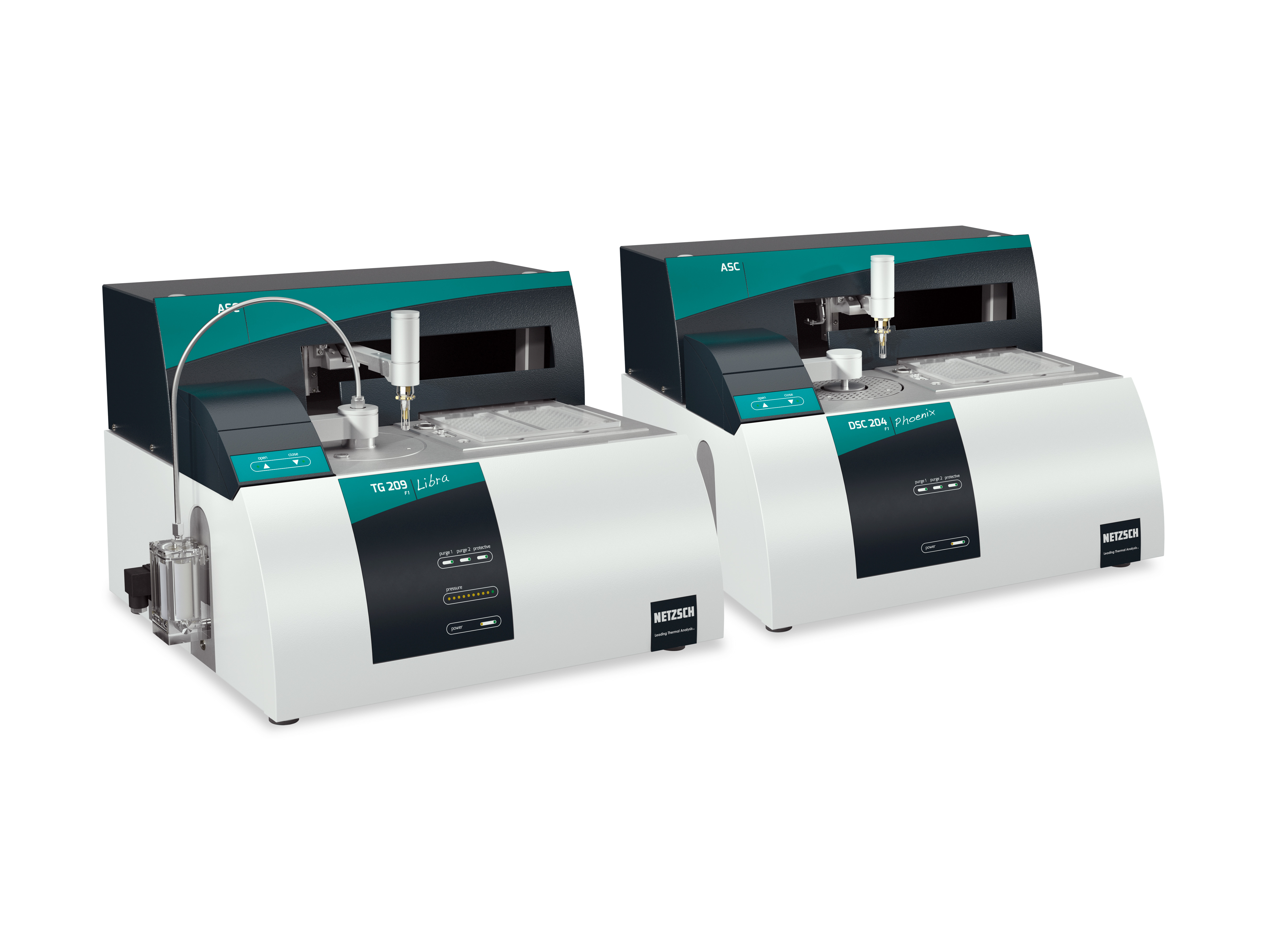 Thermoanalyse-Geräte der Firma NETZSCH Gerätebau